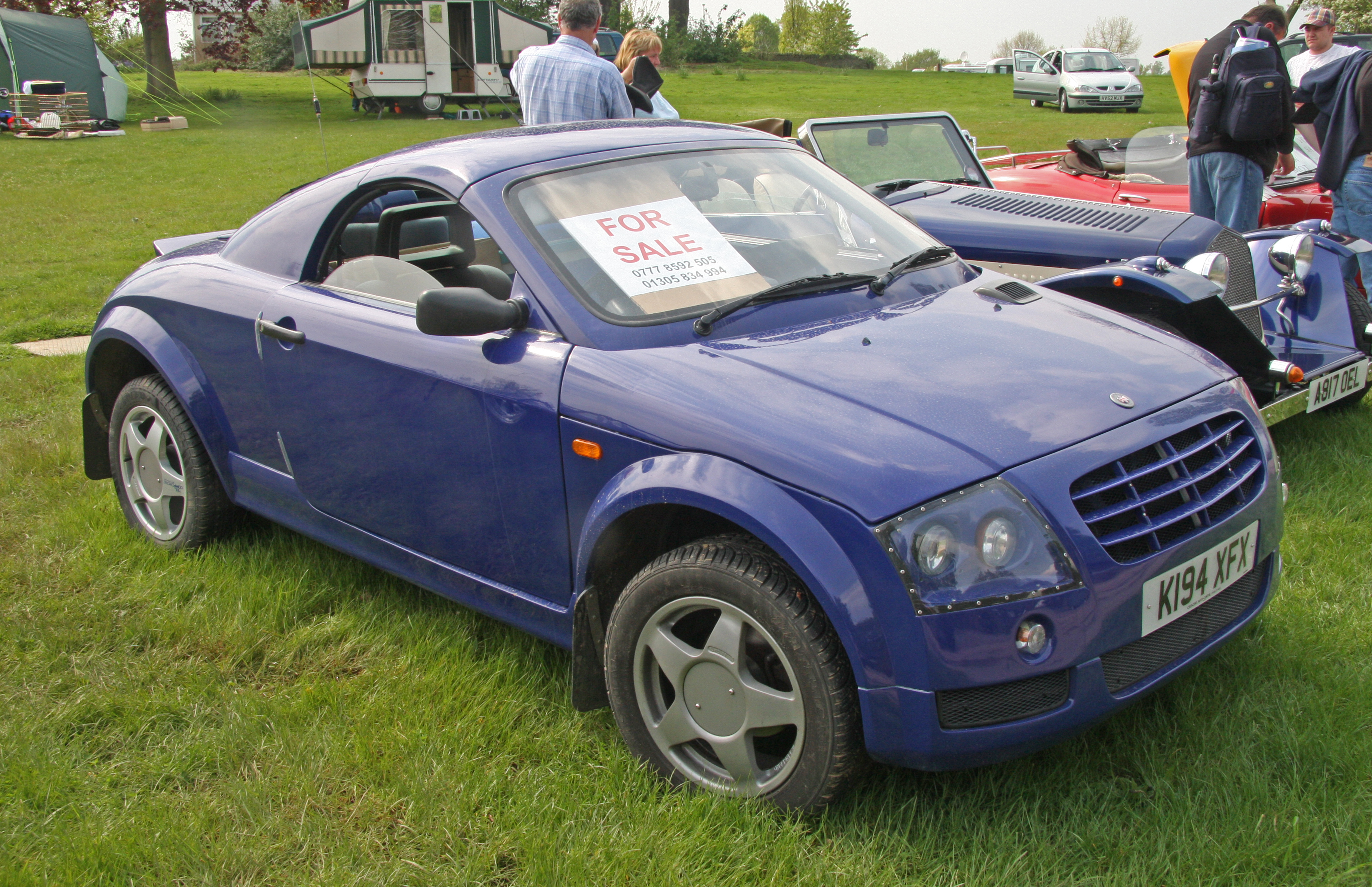 X99.html